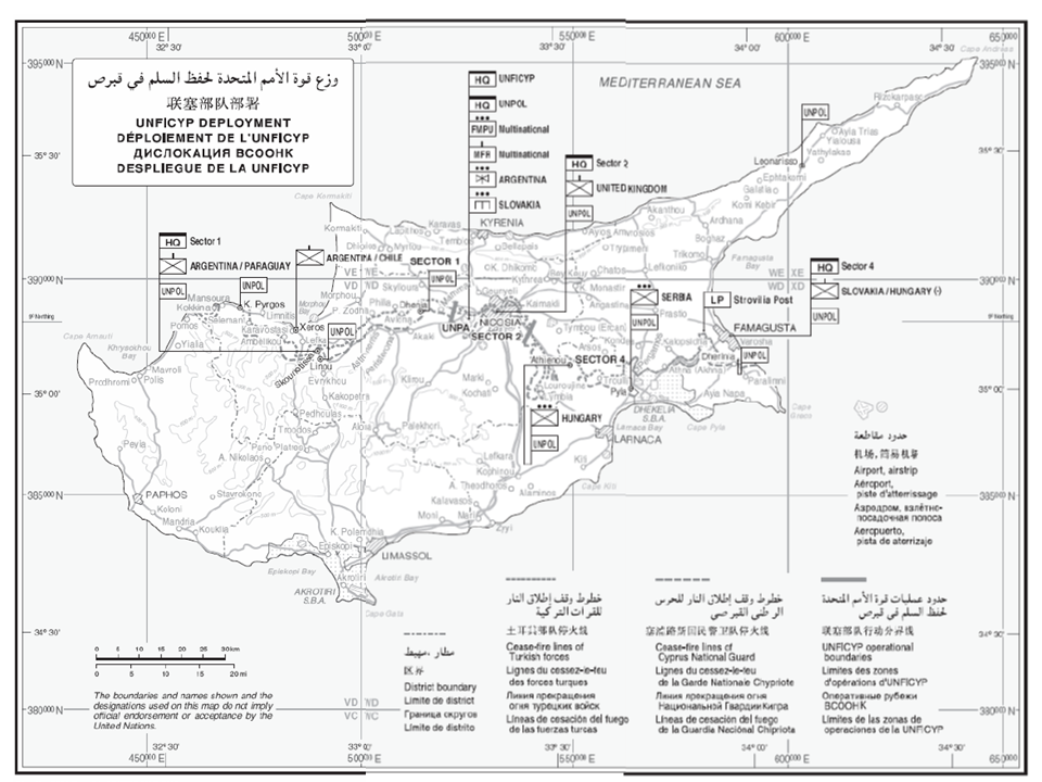 Despliegue de UNFICYP en Junio 2014.